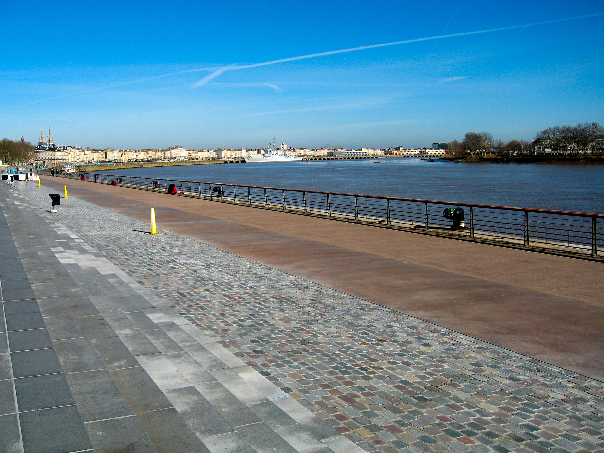 Quai de la Garonne, Bordeaux, France